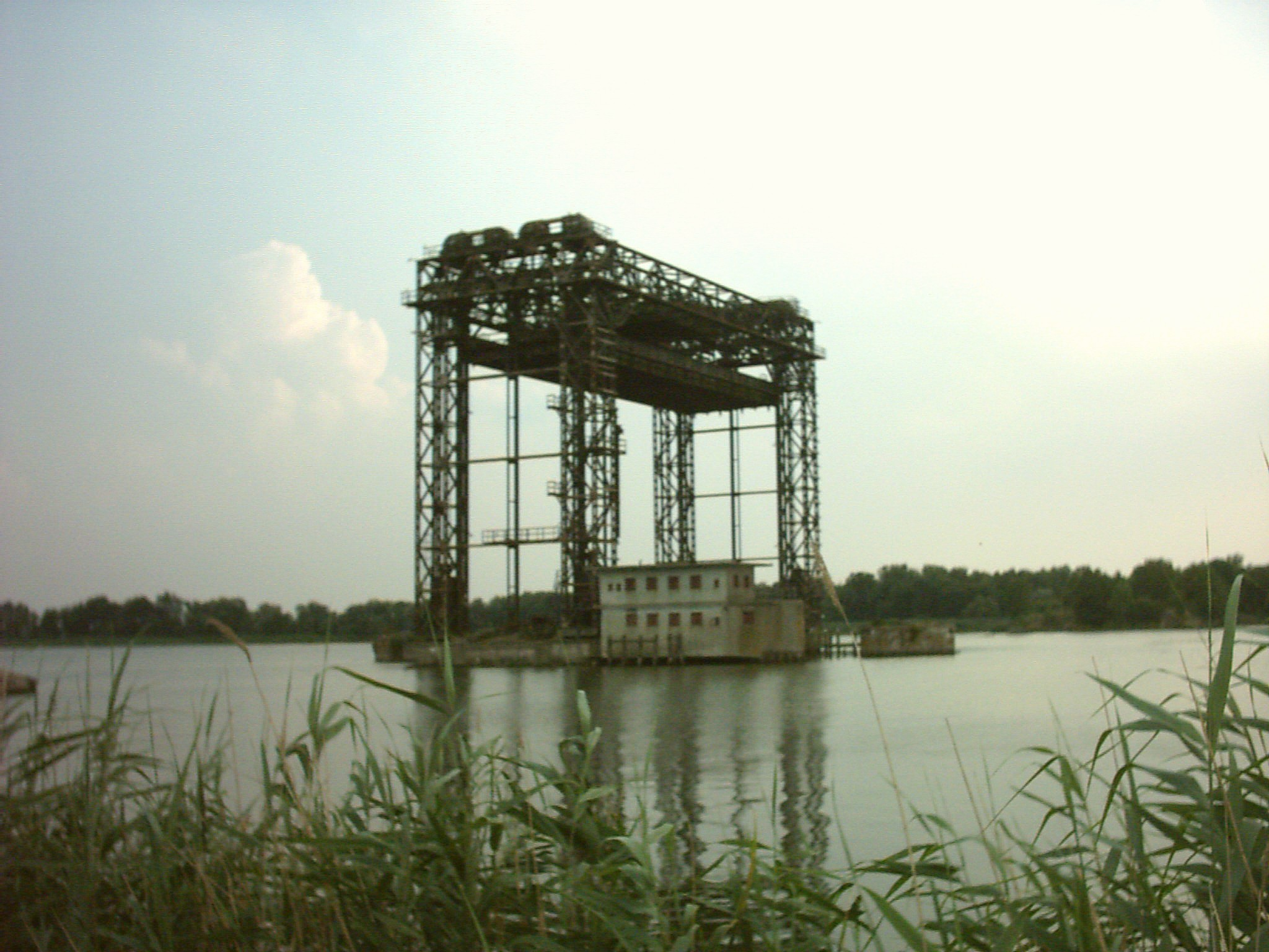 Relikt einer Eisenbahnhubbrücke im Peenestrom bei Karnin (Insel Usedom)